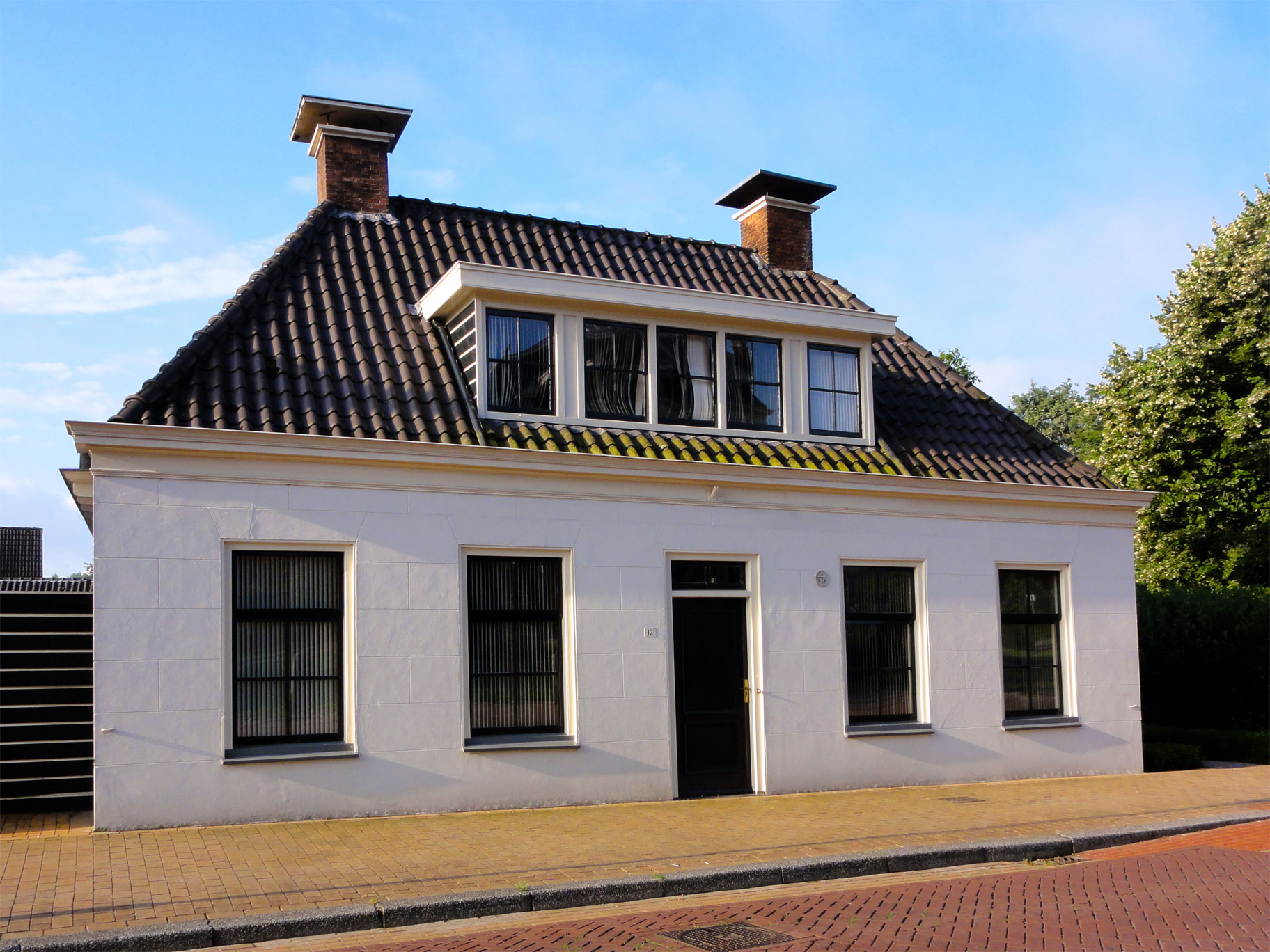 Hoofdstraat 12 Beetsterzwaag